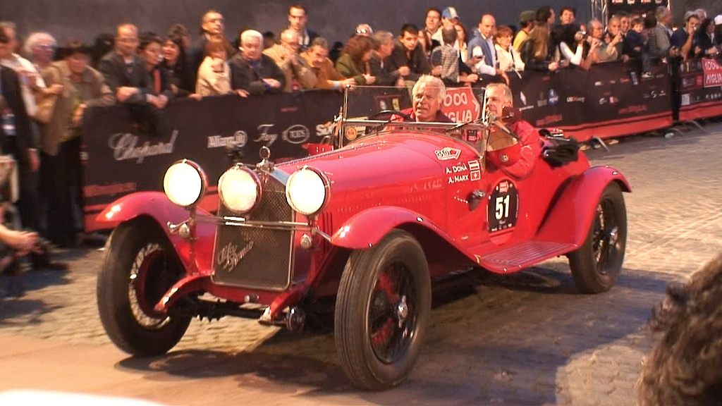 Mille Miglia 2008, 51 Marx A. CH Donà A. A ALFA ROMEO 6C 1750 Gran Sport